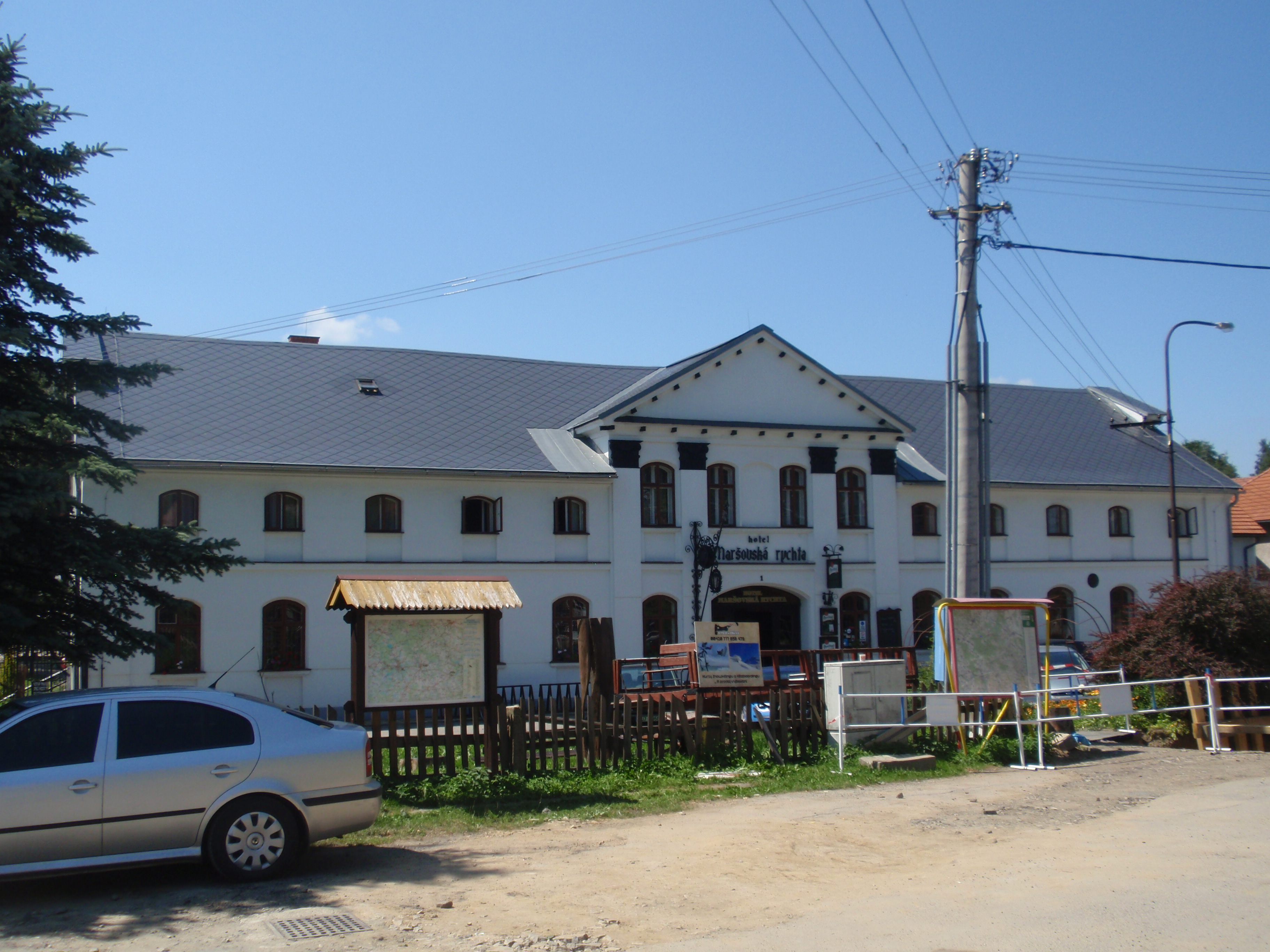 Rychta, Maršovice 1, Maršovice (Nové Město na Moravě).